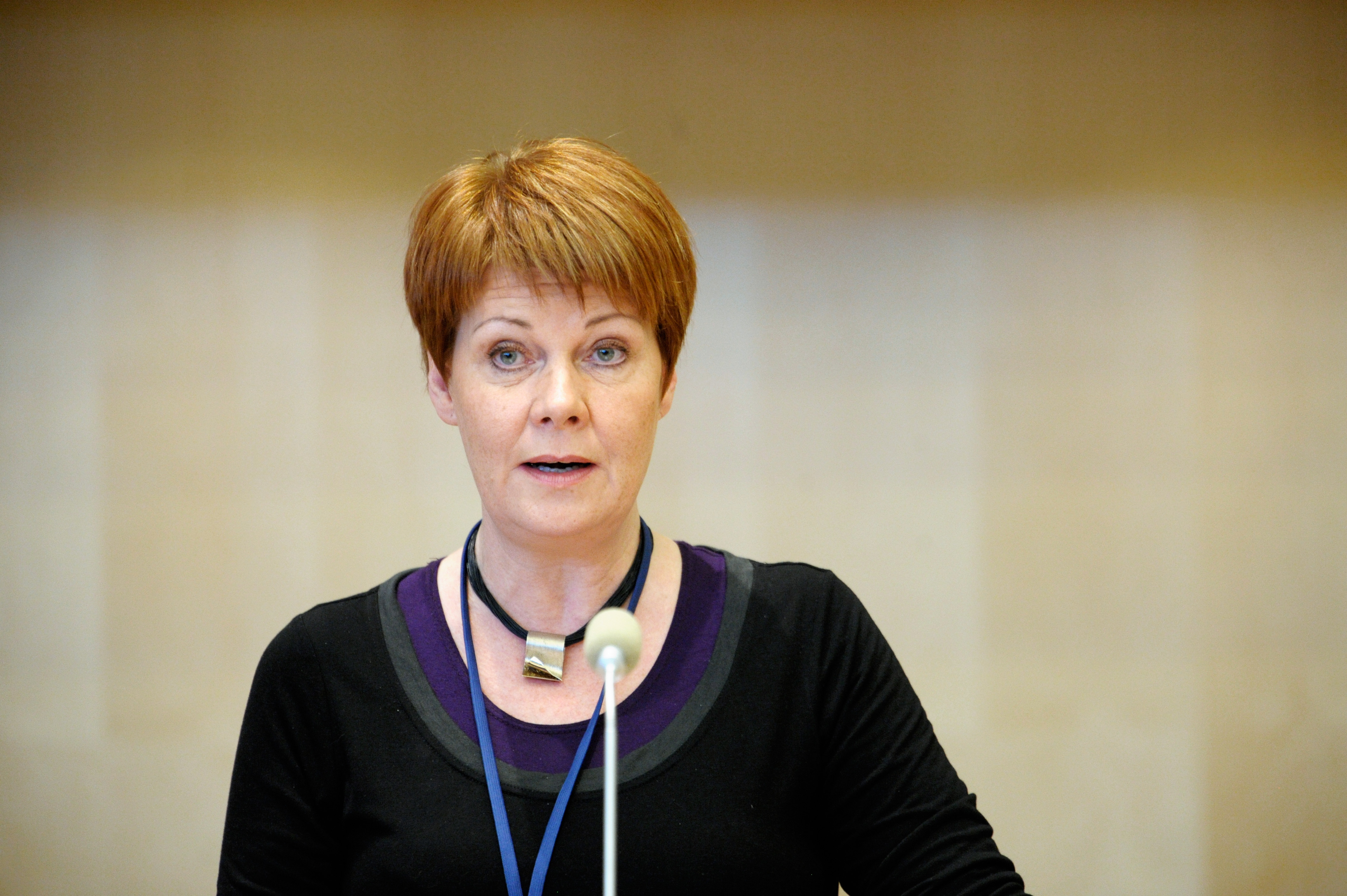 Ólína Þorvarðardóttir, Island, Nordiska rådets session i Stockholm 2009.